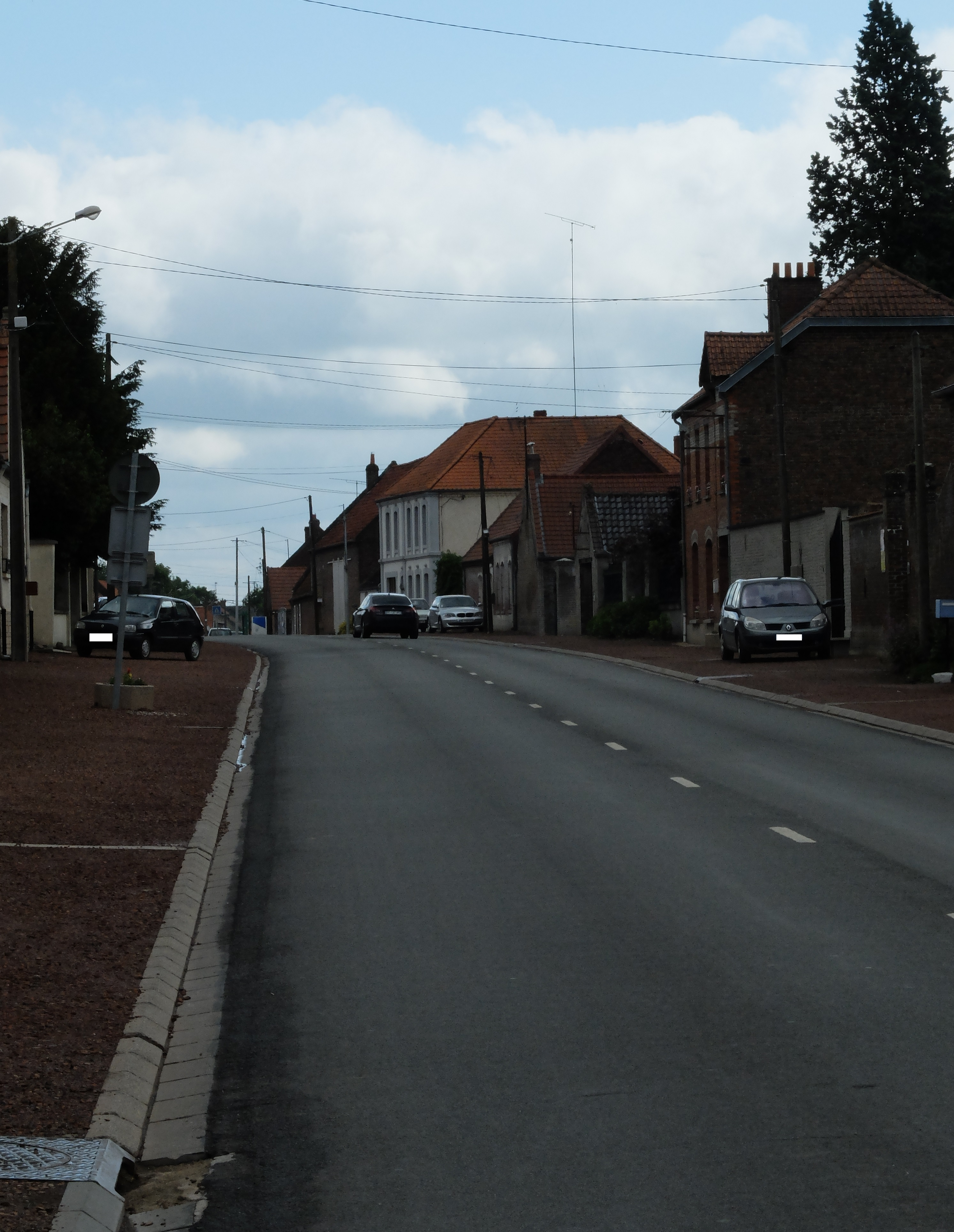 Vue de la Grande Rue de Baralle.